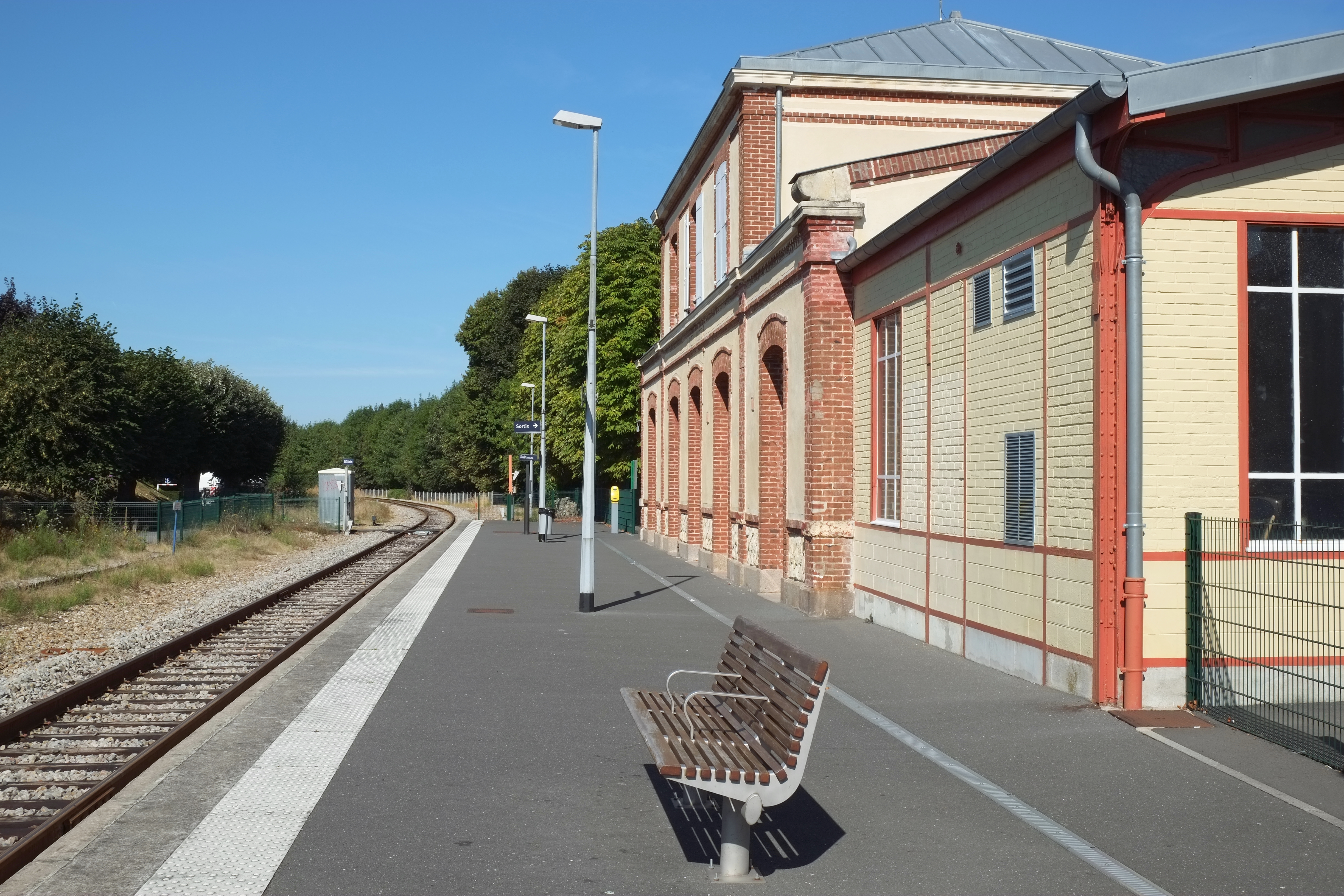 Bahnhof in Houlgate im Département Calvados in Frankreich